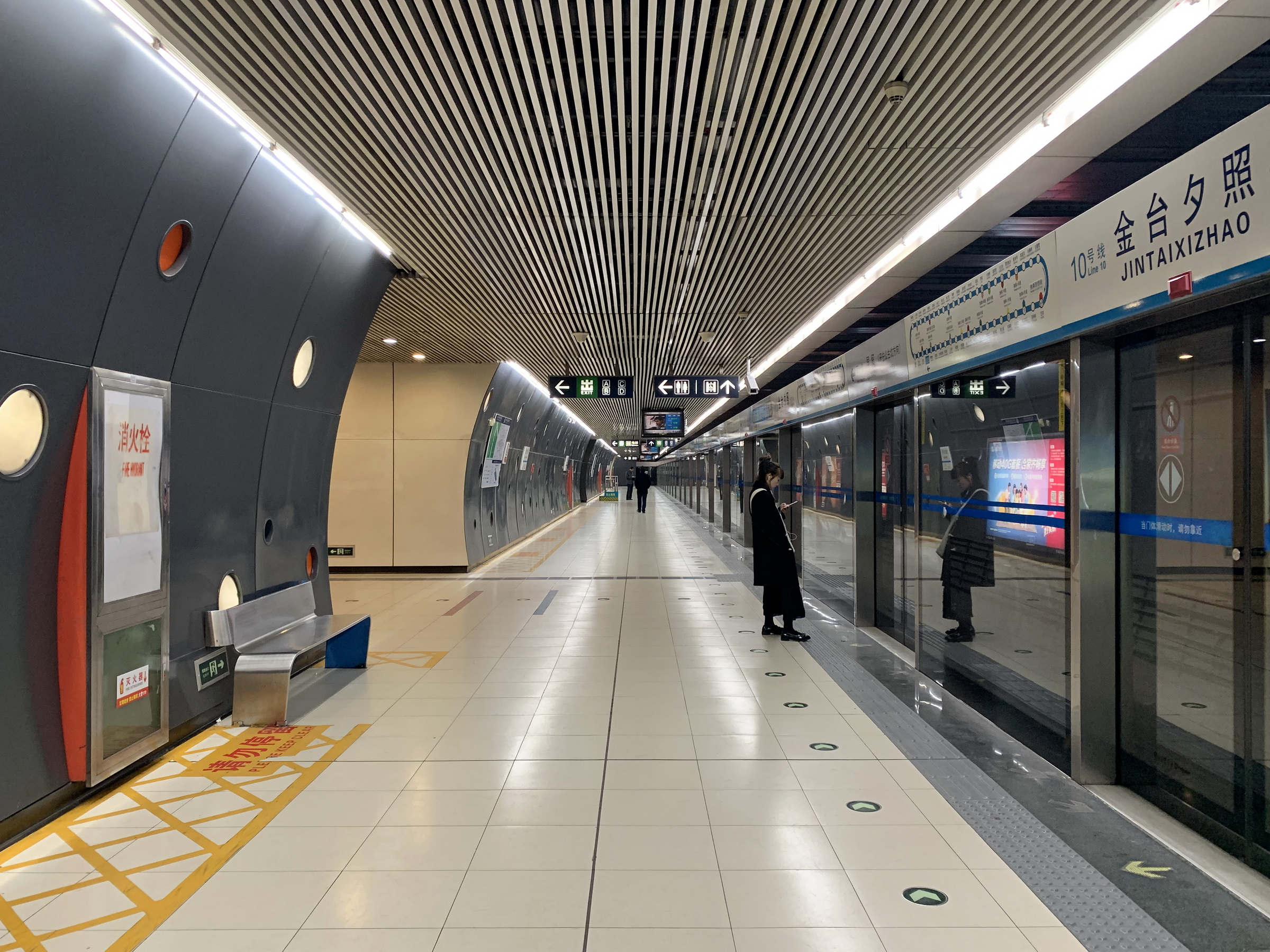 北京地铁10号线金台夕照站分离式站台